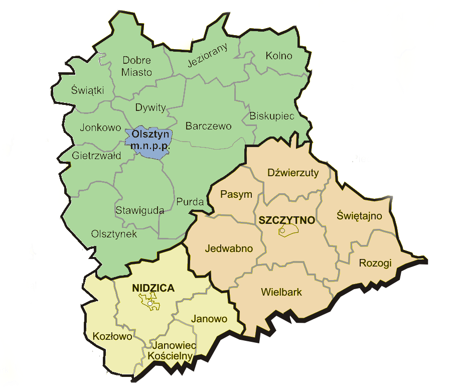 Powiatymap -WKU OLSZTYN